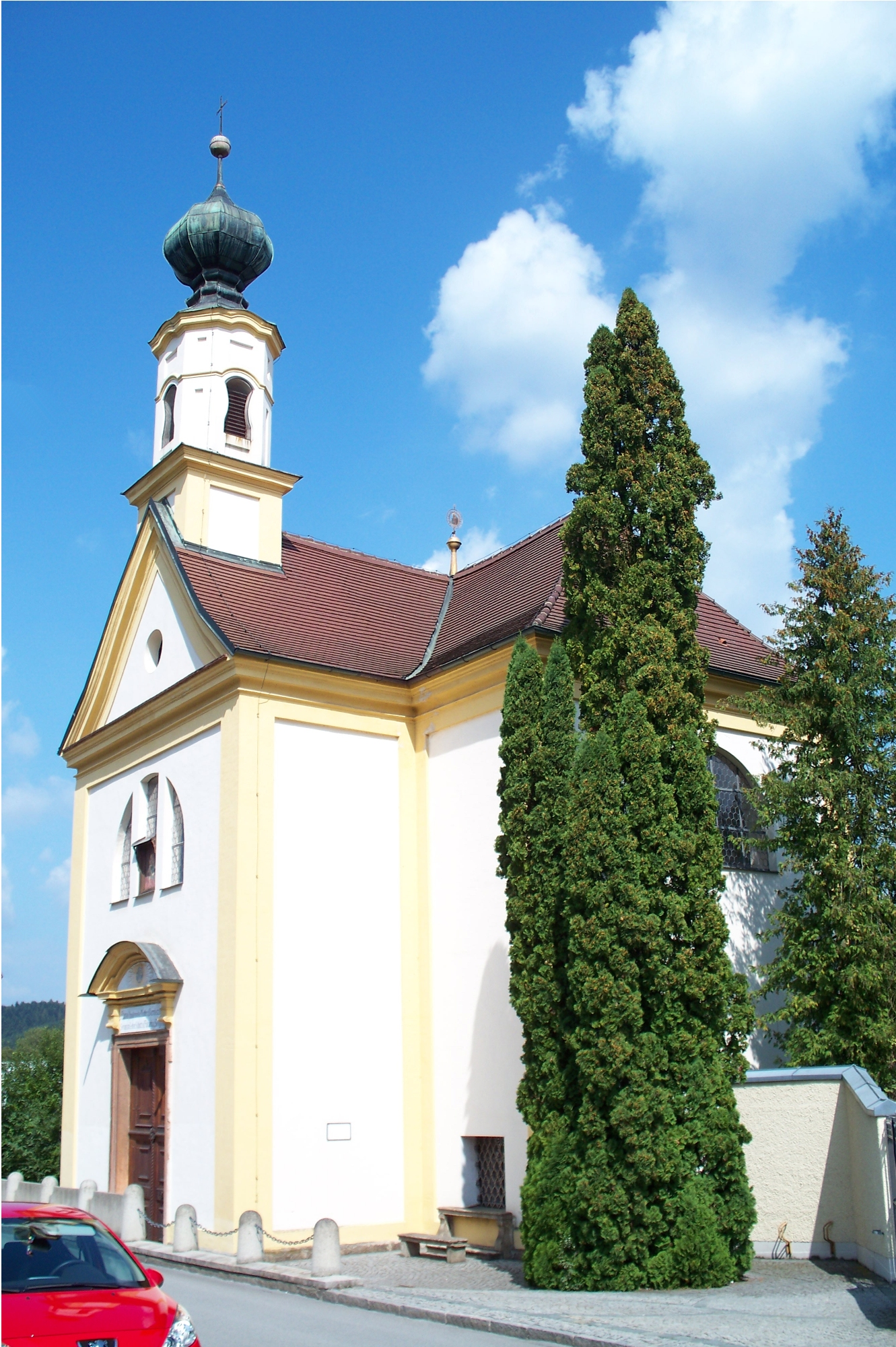 Wallfahrtskirche Maria-Hilf im Barockstil, die am 26. Oktober 1726 eingeweiht wurde.)